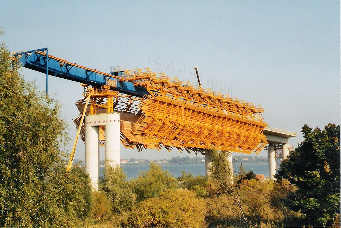 Autor: Benutzer:Klugschnacker, selbst fotografiert Stralsund, Rügenbrücke, Schalungskonstruktion für die Brücke über dem Dänholm, vom alten Rügendamm aus fotografiert im Oktober 2005. cantilevered falsework